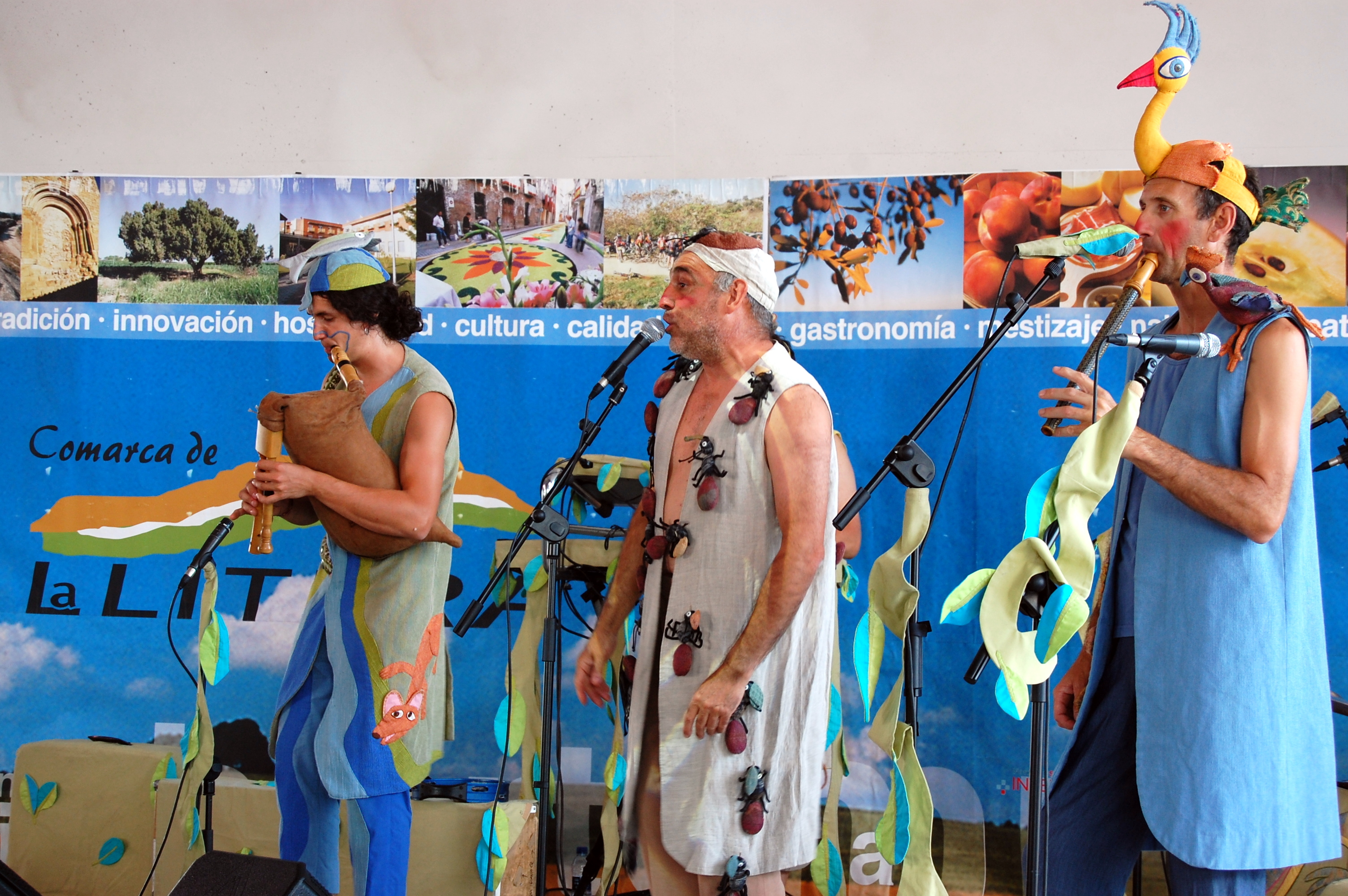 Día de la Litera.